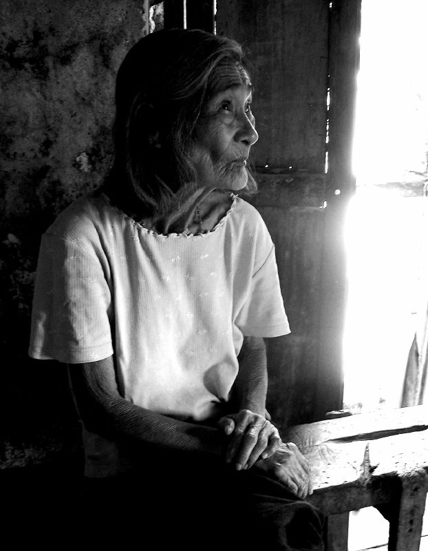 An Ivatan woman inside her house